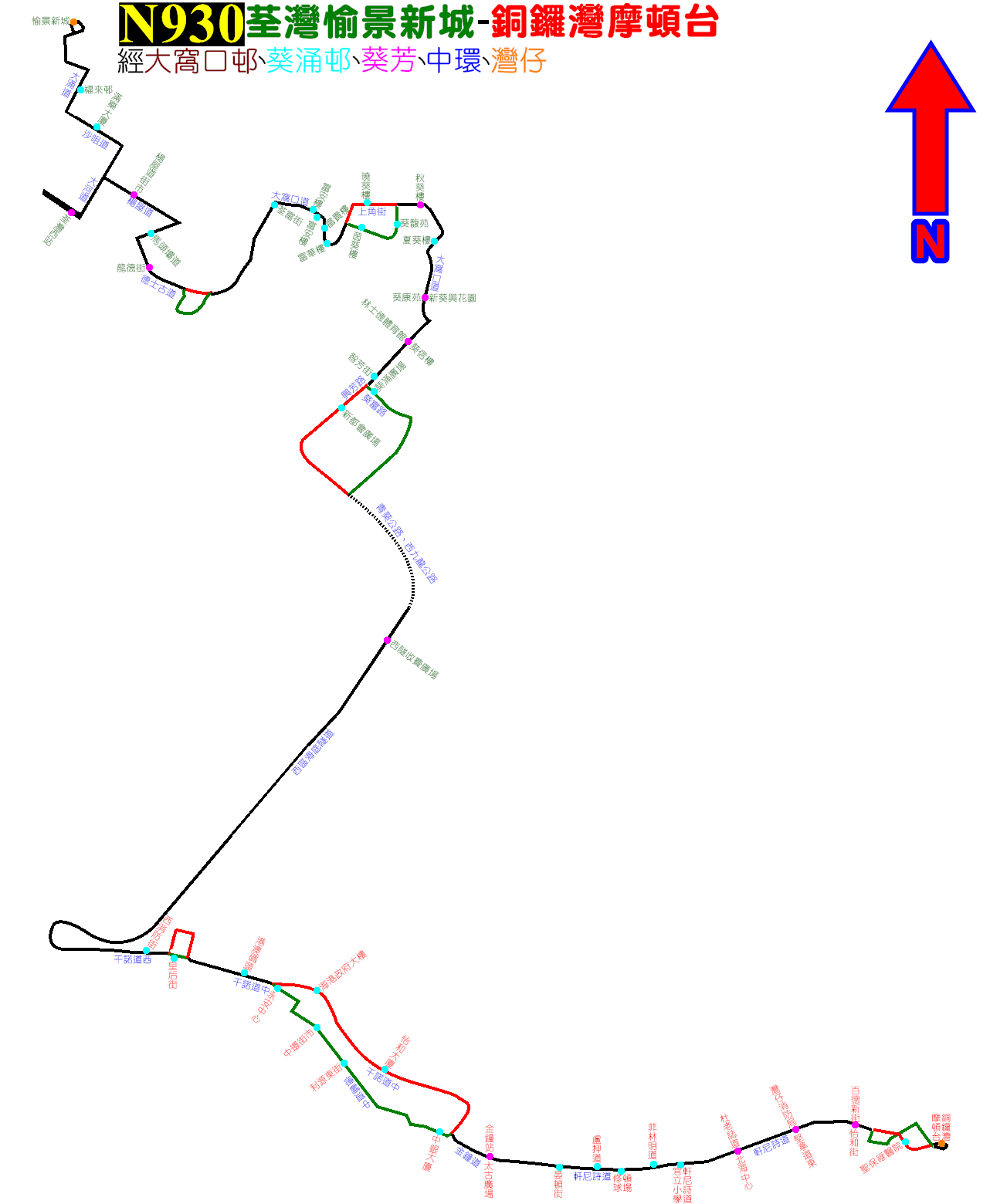 過海隧巴N930線的走線圖